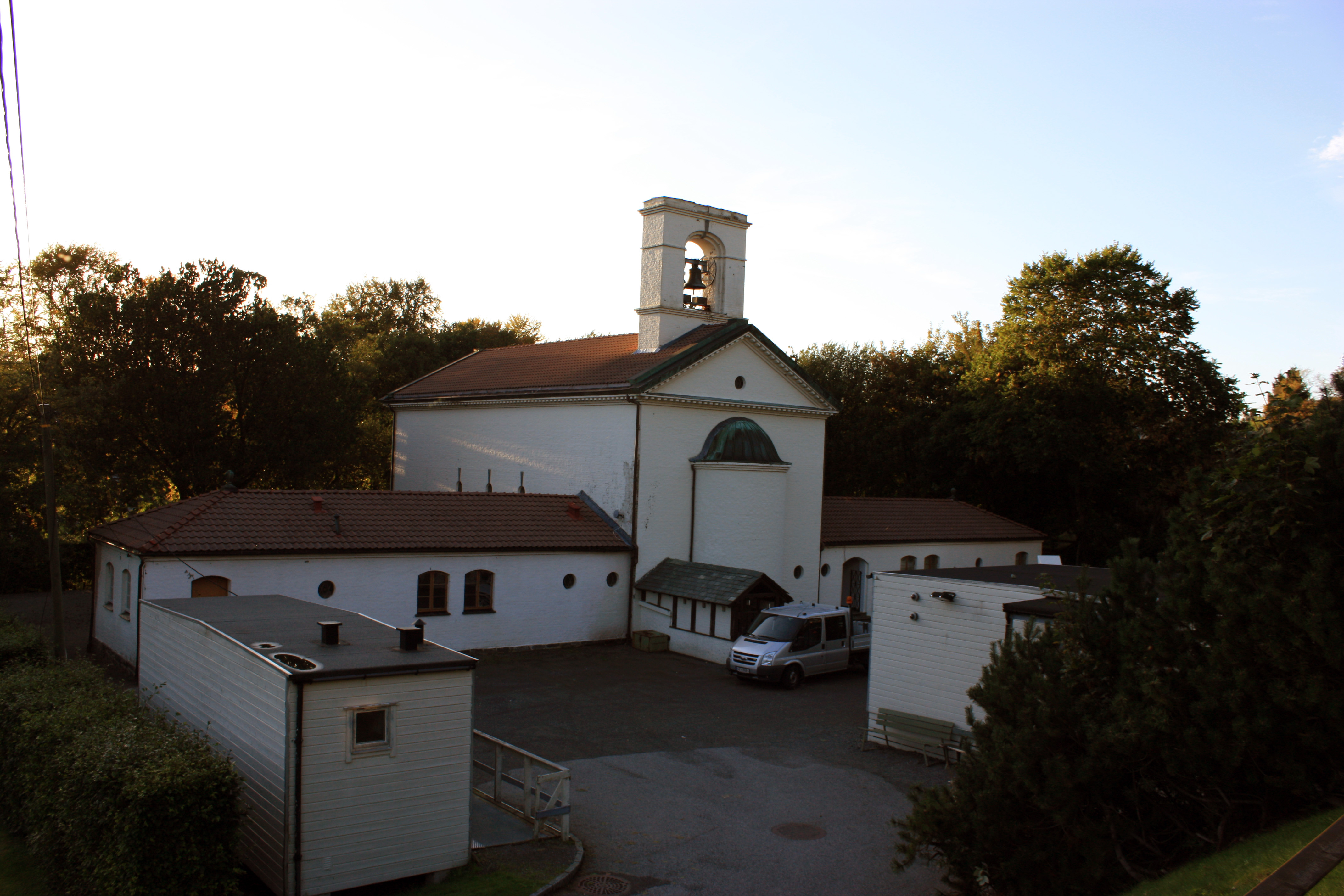 Chapel at Øvsttun cemetery, Fana, Bergen.